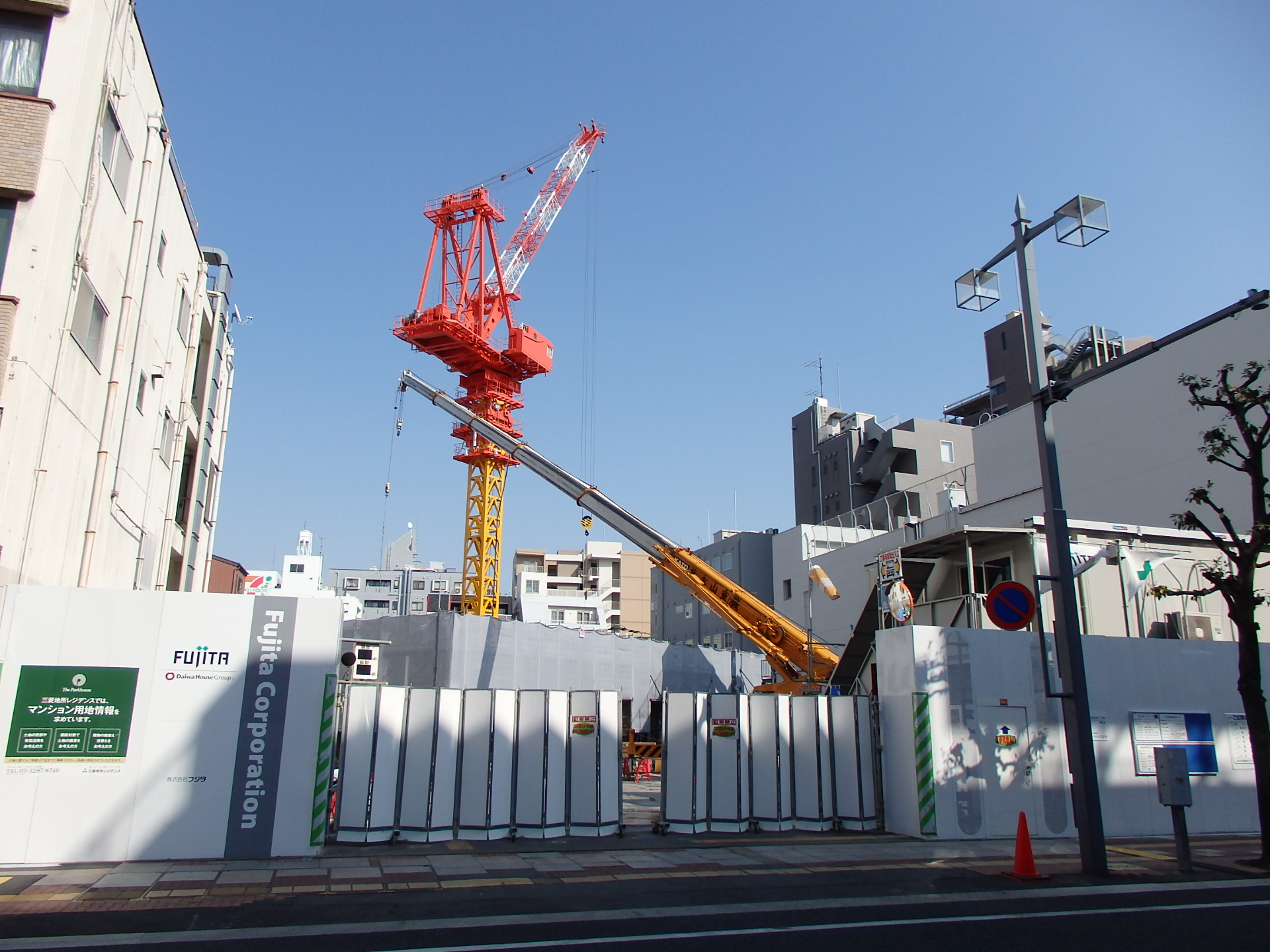 ザ・パークハウス浦和タワー建設中